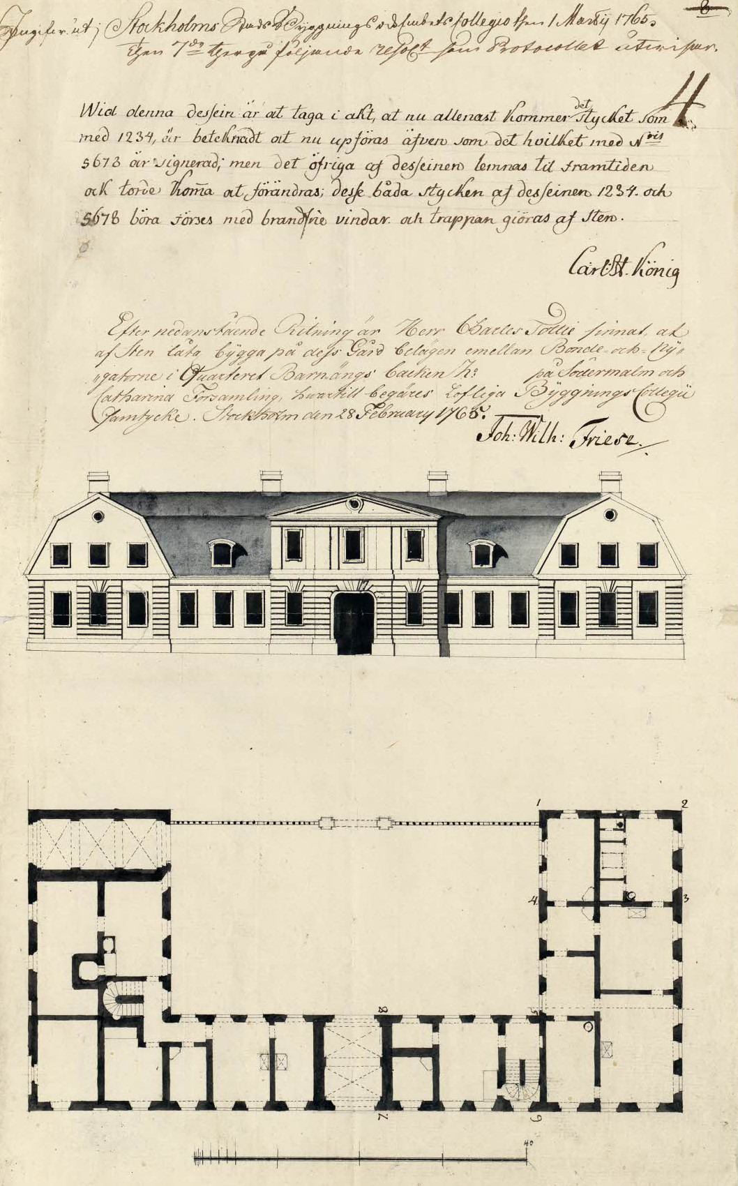 Tottieska malmgården på Södermalm, Stockholm, bygglovsritning (beskuren)